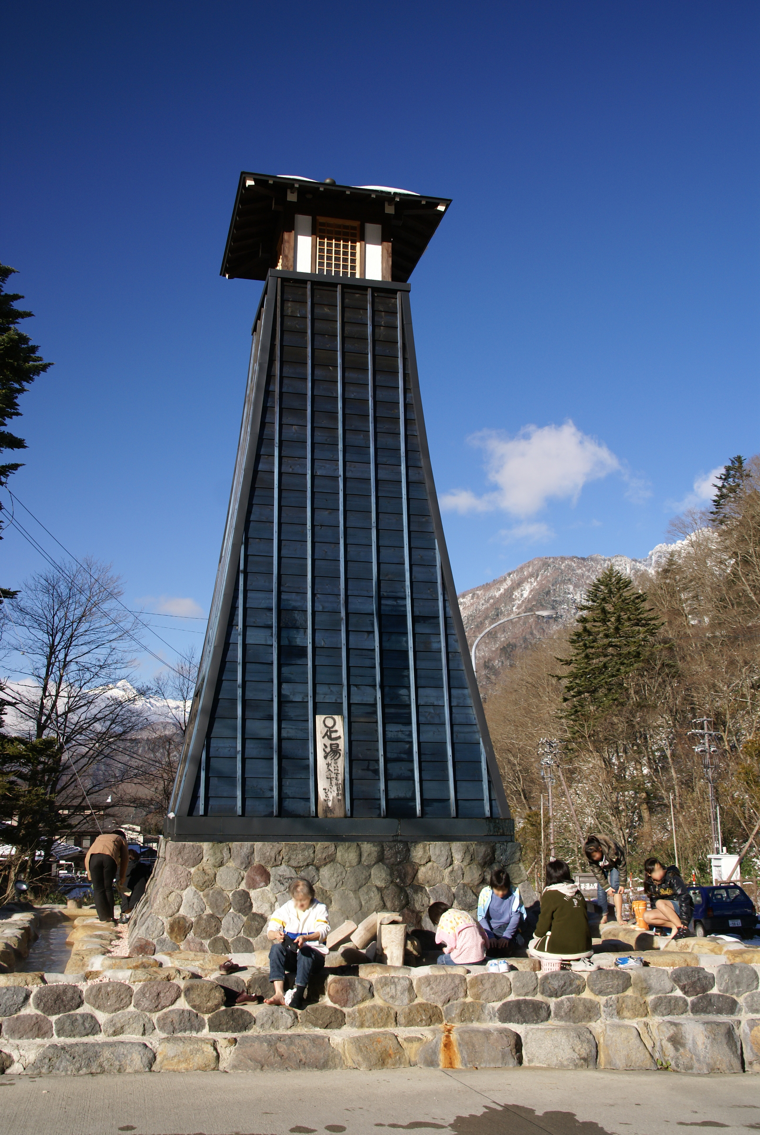 Hirayu Onsen in Takayama, Gifu prefecture, Japan